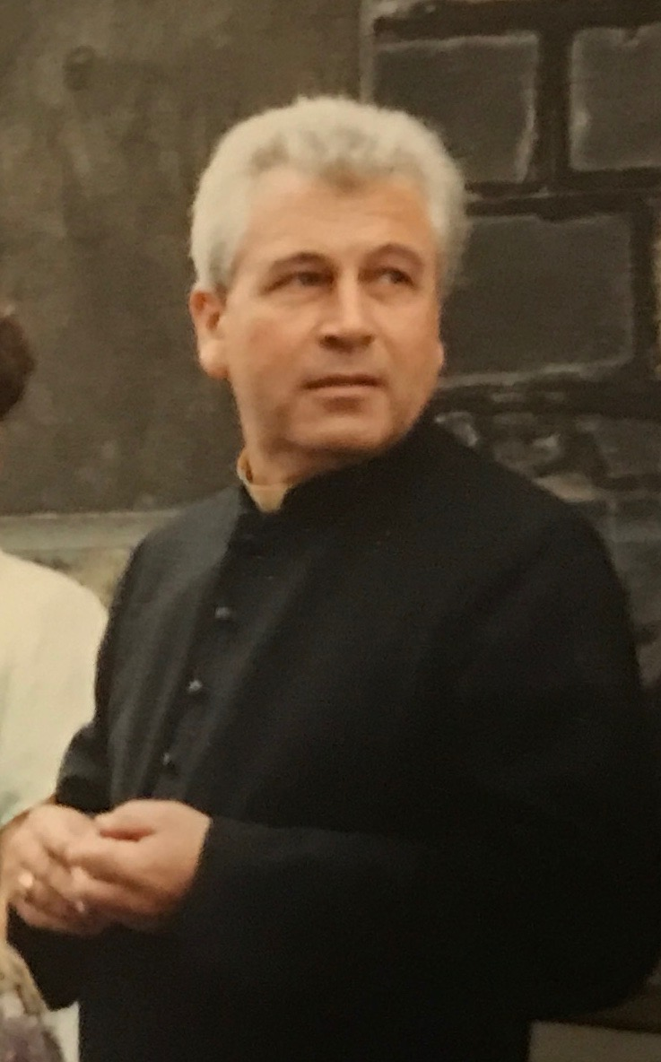 Dr. Antonín Sporer v 80. letech 20. století